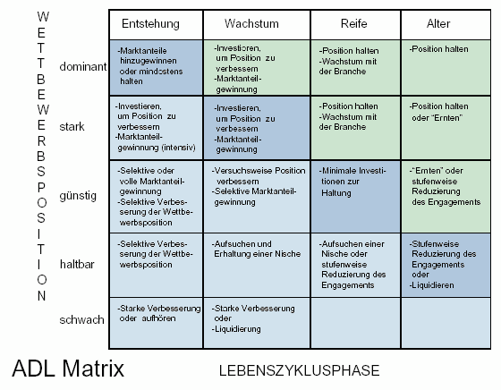 Arthur D. Little (ADL)-Produktlebenszyklus, Darstellung als eingefärbte Grafik unter GNU-FDL erstellt